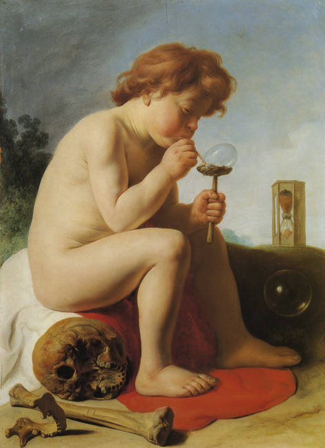 Niño soplando pompas de jabón: Homo Bulla, de Jan Lievens, Musée des Beaux-Arts et d'Archéologie de Besançon